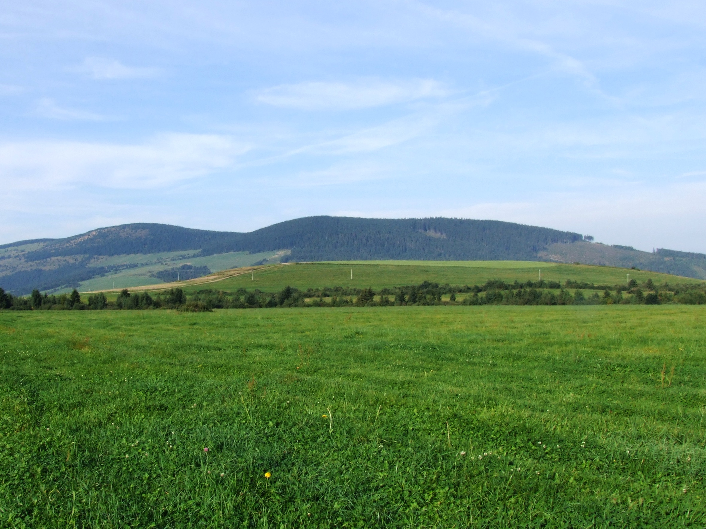 U góry Mach i Mnich (wzniesienia Pogórza Orawskiego), pod nimi wzgórze Chotár nad Zubercem